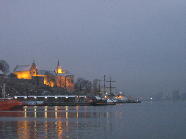 Akershus Kalesi, Oslo, Norveç